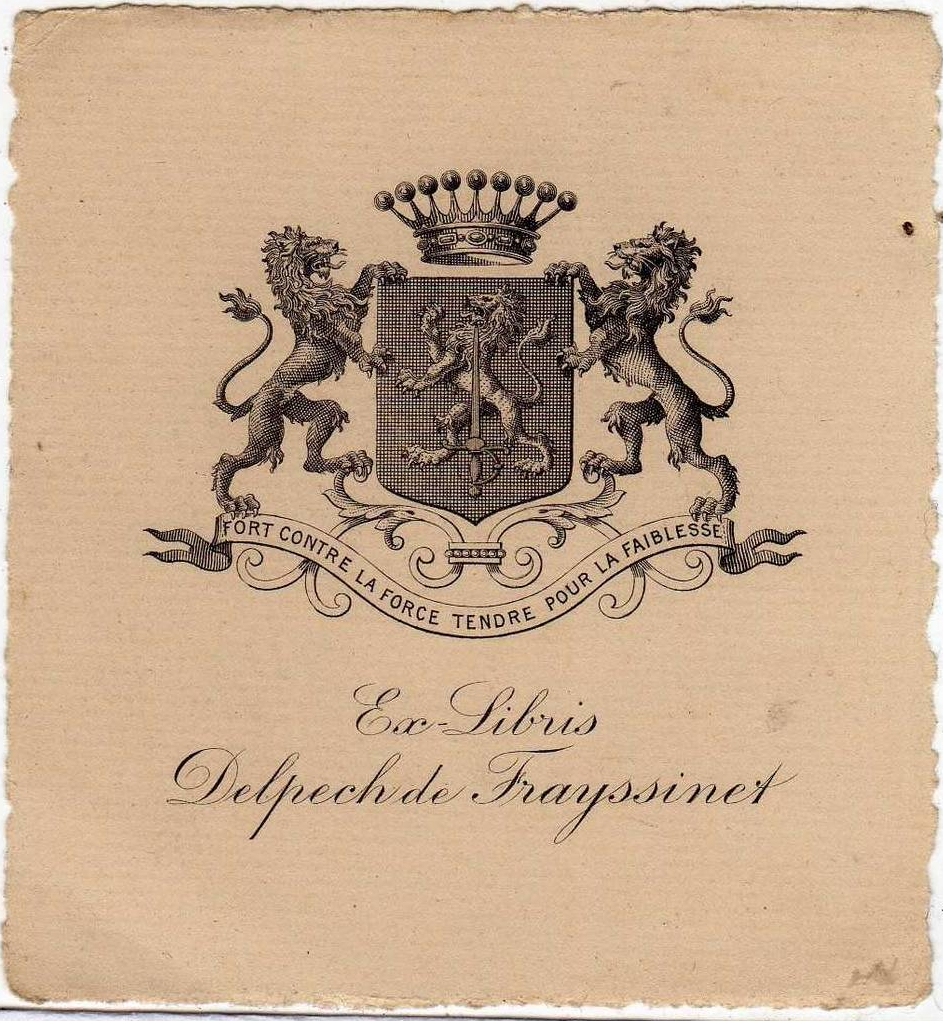 Ex-libris de la famille Delpech de Frayssinet, ca 1850